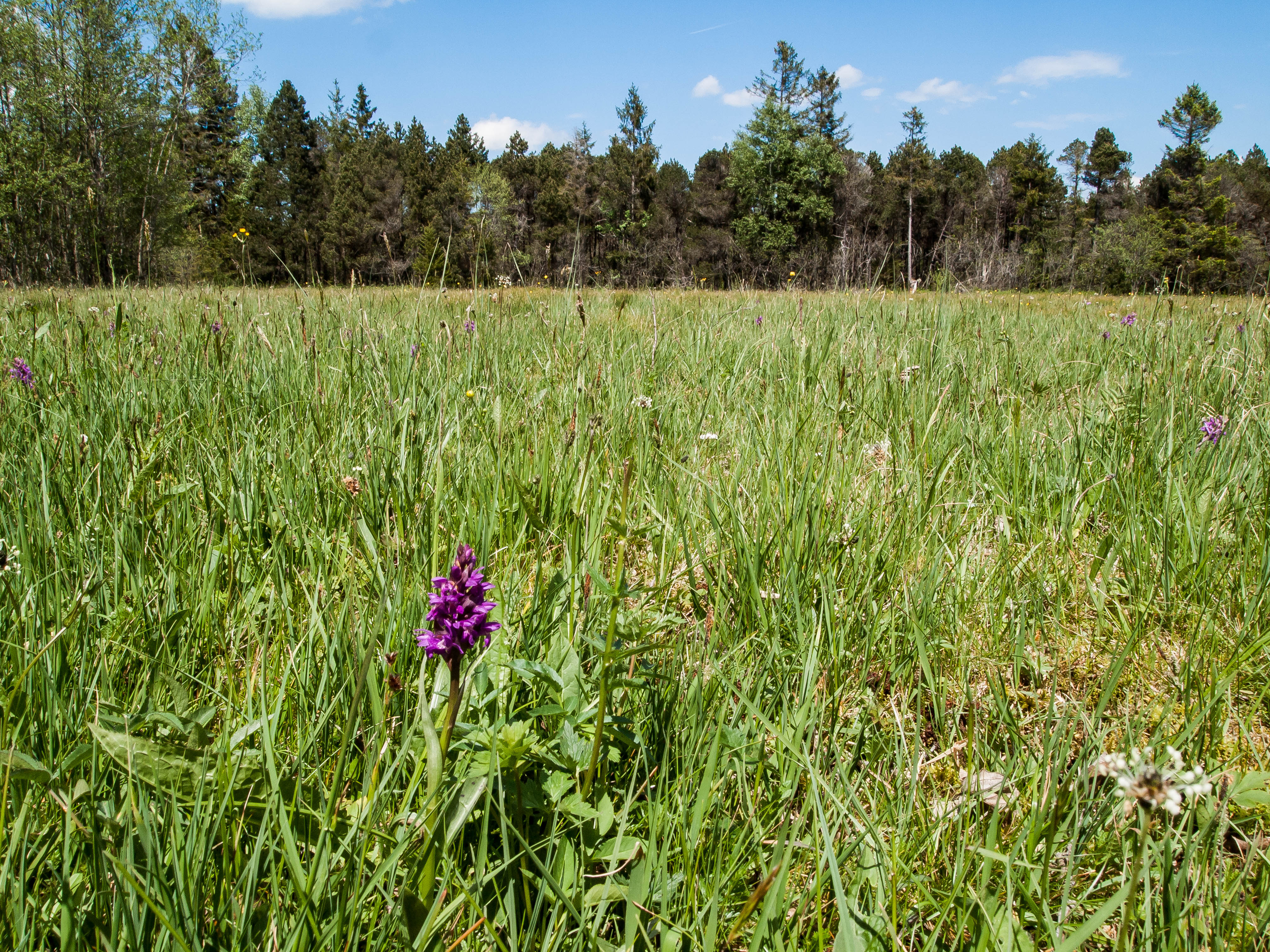 Blick von Südosten auf das Waldstück Breitfilz bei Schönberg, Oberbayern. Im Vordergrund liegt eine Feuchtwiese mit Breitblättrigem Knabenkraut (Dactylorhiza majalis). (LSG:BY-LSG-00068.01)_Schutz des Breitfilzes Gemarkung Schönberg, Landkreis Schongau.